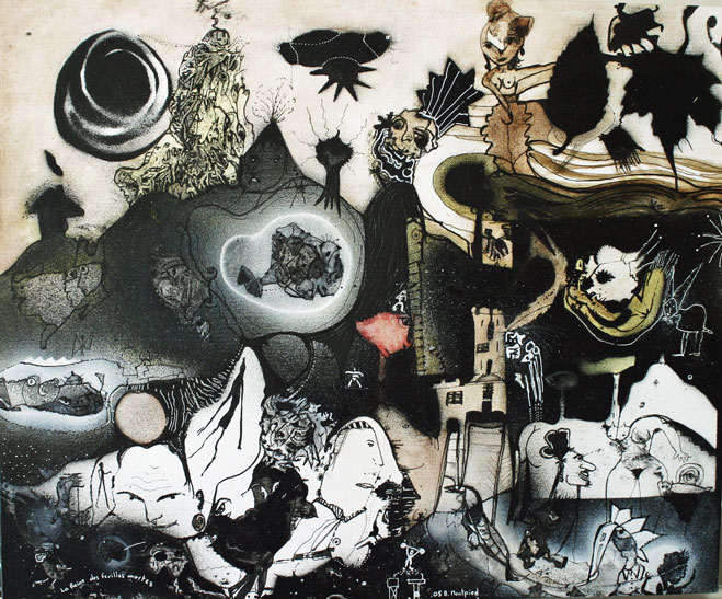 La reine des feuilles mortes, Bruno Montpied, 2005 (46 cm x 38 cm, technique mixte sur carton entoilé)